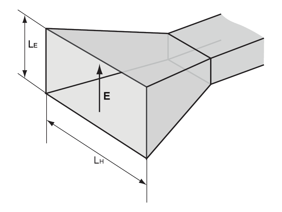 Pyramidal horn antenna, schematics (Пирамидальная рупорная антенна, схематическое изображение)